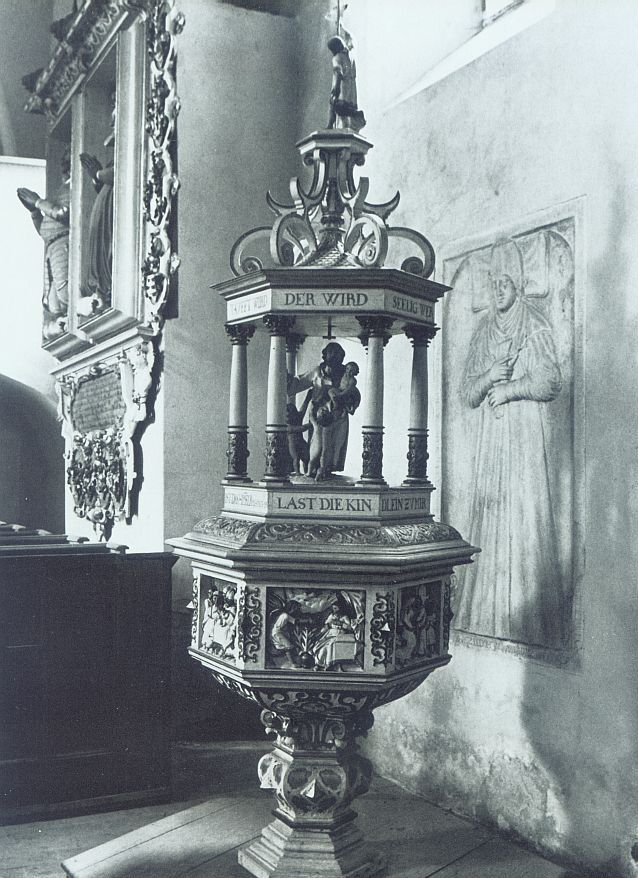 Kościół Imienia NMP, chrzcielnica, Szydłowiec Śląski, gmina Niemodlin, powiat opolski, województwo opolskie